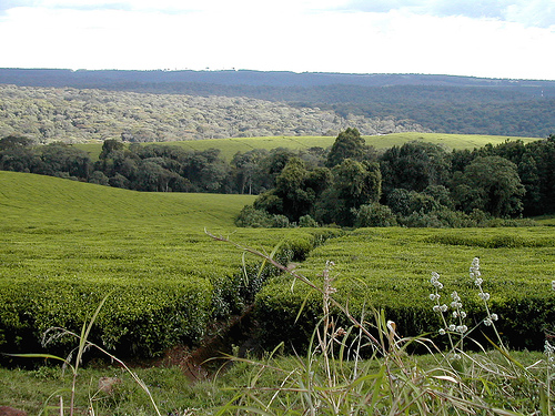 Teacrop, Kenya